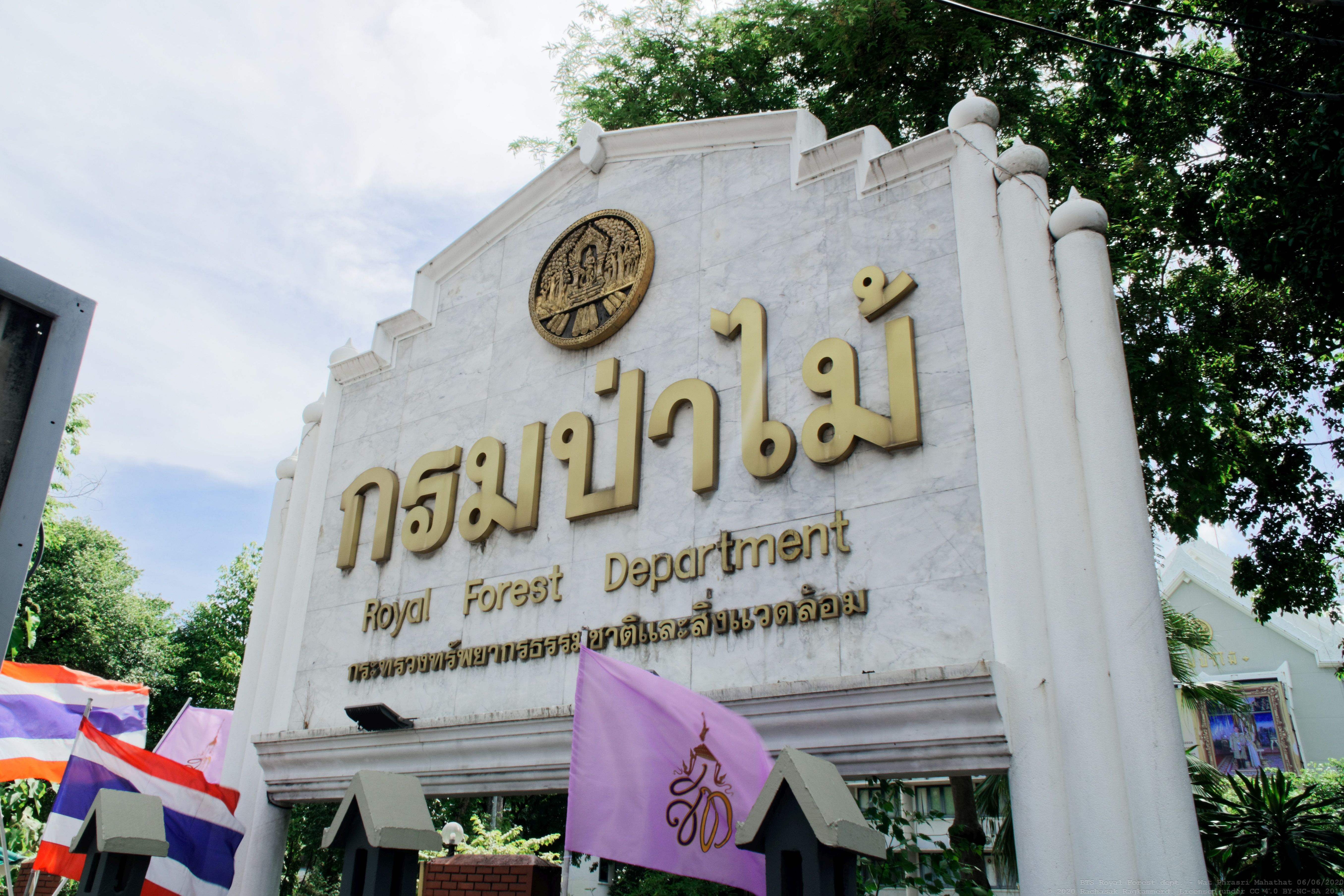 กรมป่าไม้